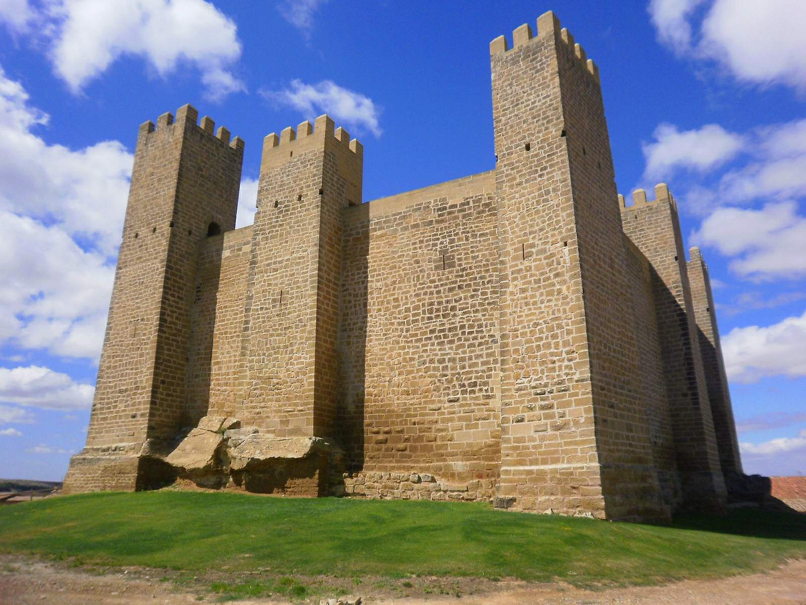 Castillo de Sádaba (Zaragoza)